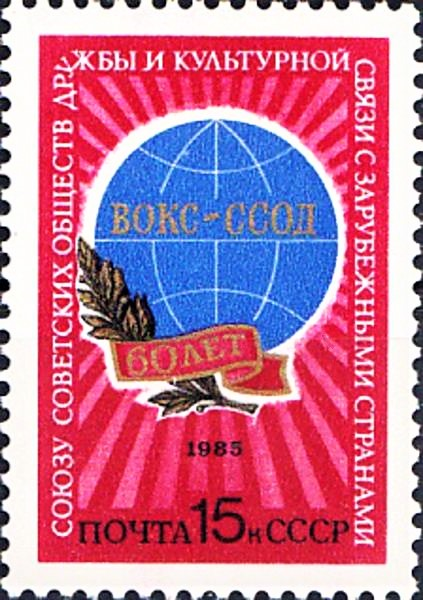 Почтовая марка СССР. Эмблема Союза советских обществ дружбы и культурной связи с зарубежными странами. Номер в каталоге ЦФА 5610